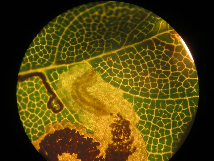 Raupe von Stigmella speciosa im Blatt von Acer pseudoplatanus